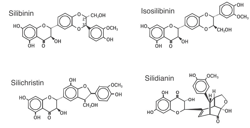 структурные формулы веществ, содержащихся в силимарине